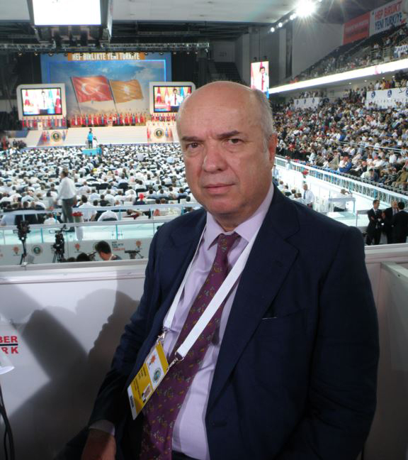 27 Ağustos 2014 tarihindeki 1. Adalet ve Kalkınma Partisi Olağanüstü Kongresi'ni Habertürk gazetesi adına izleyen Koru.